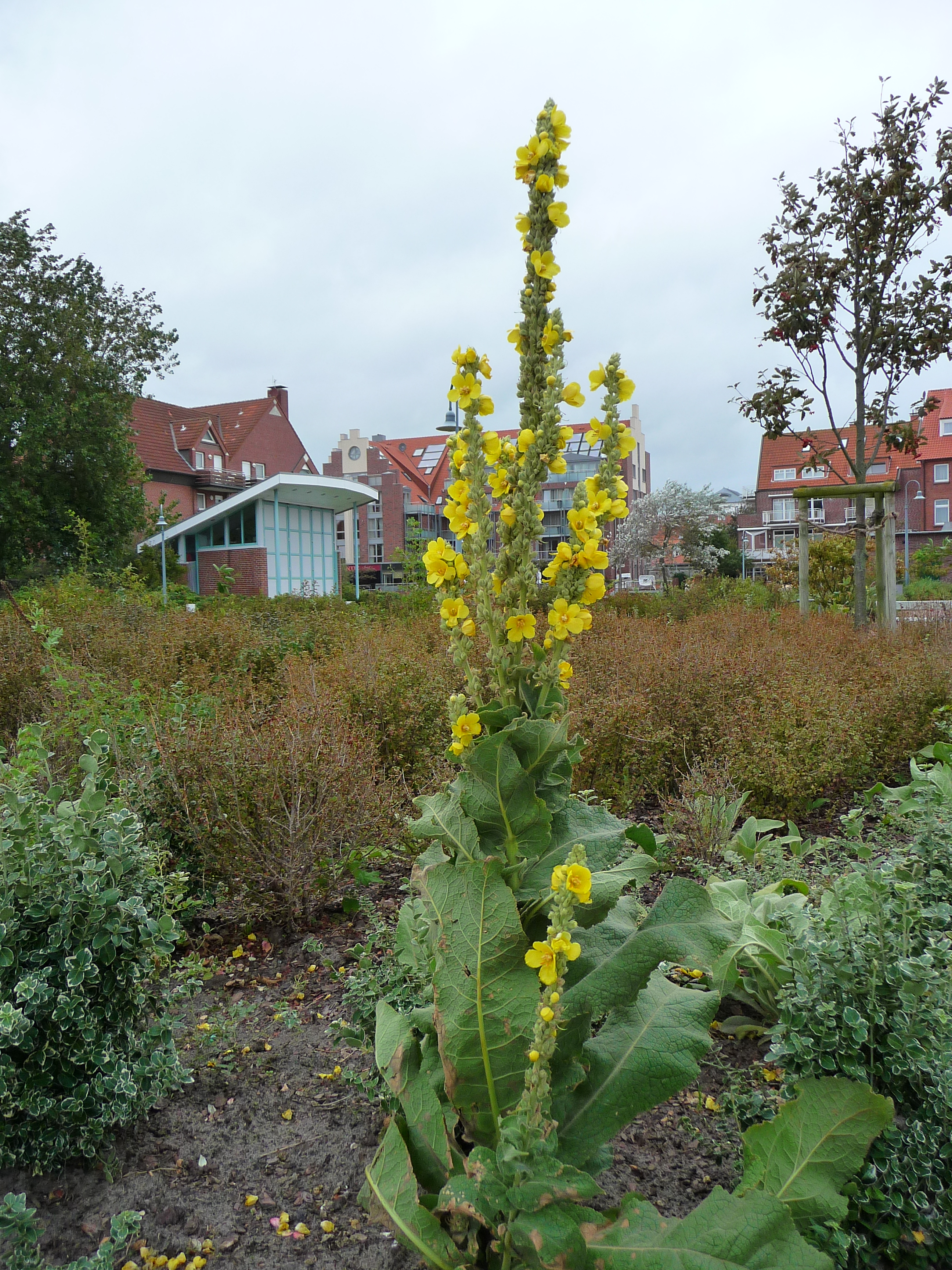 Kleinblütige Königskerze (Verbascum thapsus), fotografiert vor dem Kurplatz auf der ostfriesischen Nordseeinsel Juist (Niedersachsen, Deutschland)